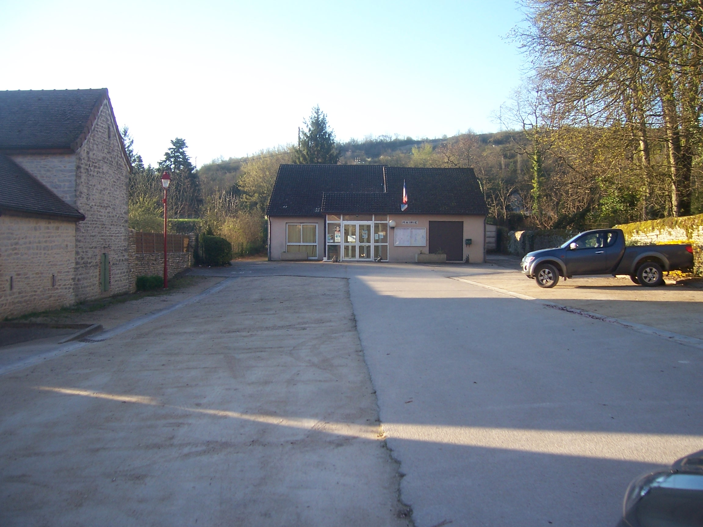 Mairie de Remigny